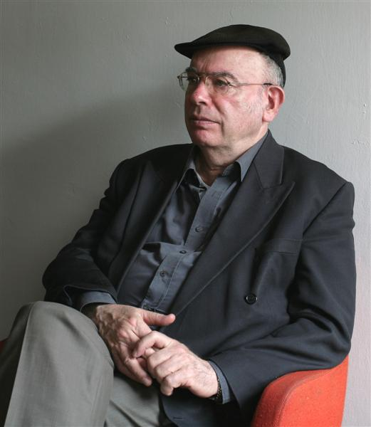 תצלום דיוקן מרדכי עומר